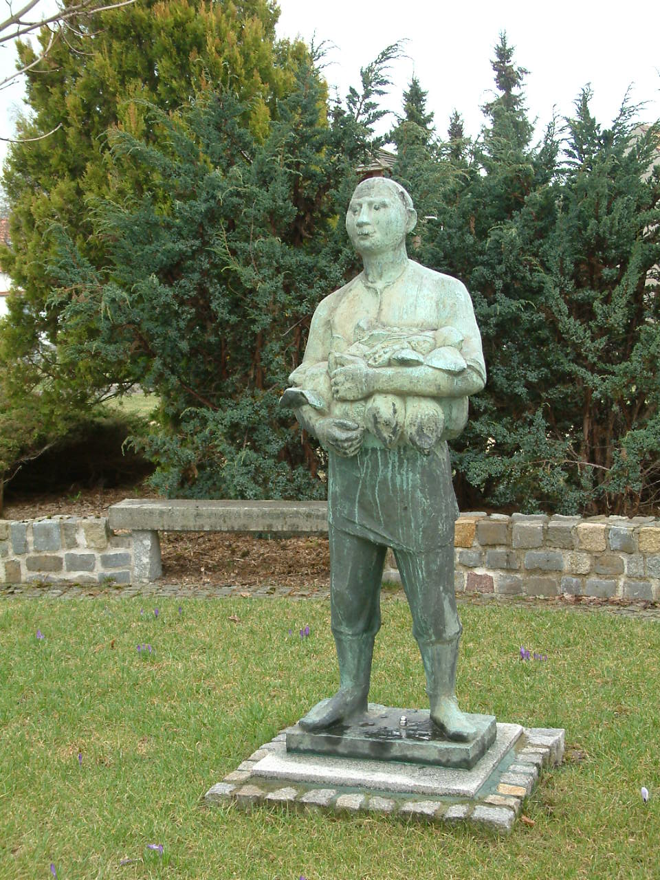 Skulptur "LPG-Bauer" (1960) des Hoyerswerdaer Bildhauers Jürgen von Woyski (1929-2000) vor dem Zeißig-Hof in Zeißig, bei Hoyerswerda.